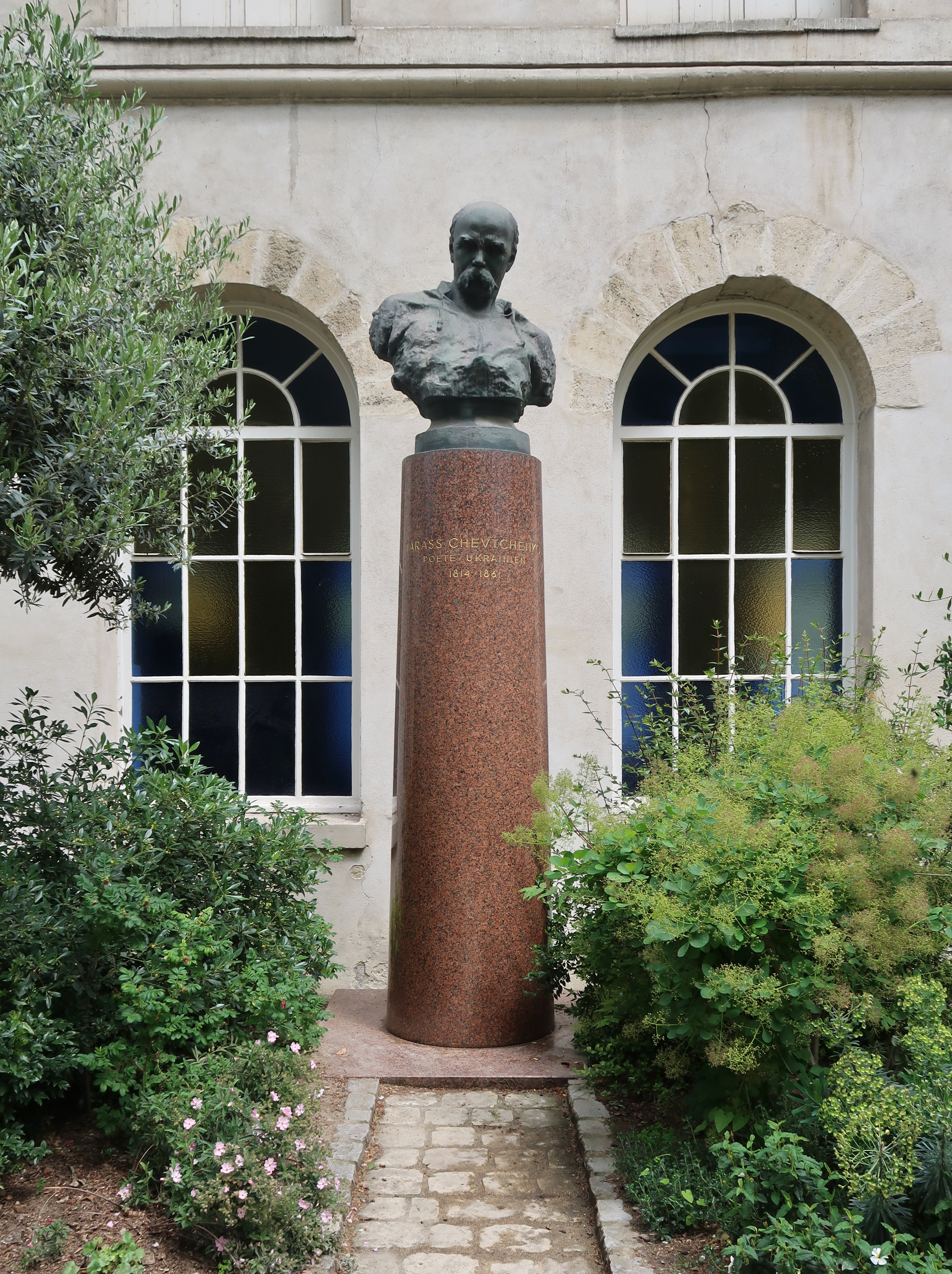 Square de Tarass Chevtchenko dans le square homonyme (Paris, 6e).